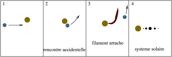 Hypothèse du scénario catastrophique de formation du système solaire de Buffon. Auteur : RÃ©gis Lachaume